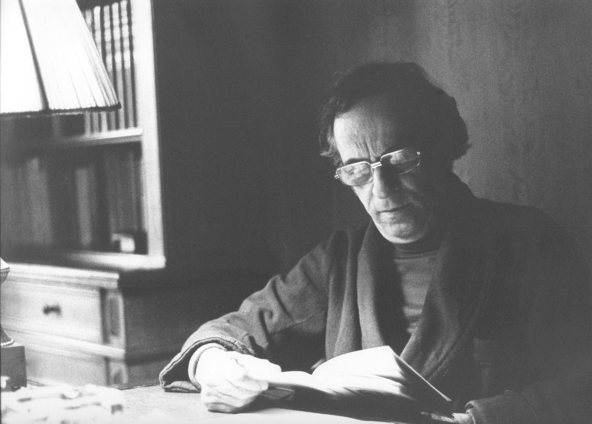 Carlo Cammarota nel suo studio